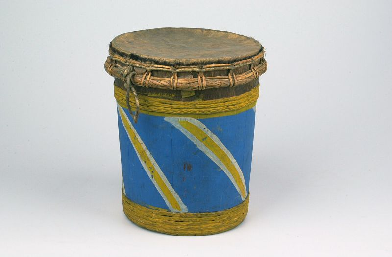 Slaginstrument. Enkelvellige cilindrische trom Unknown language: Dogdog